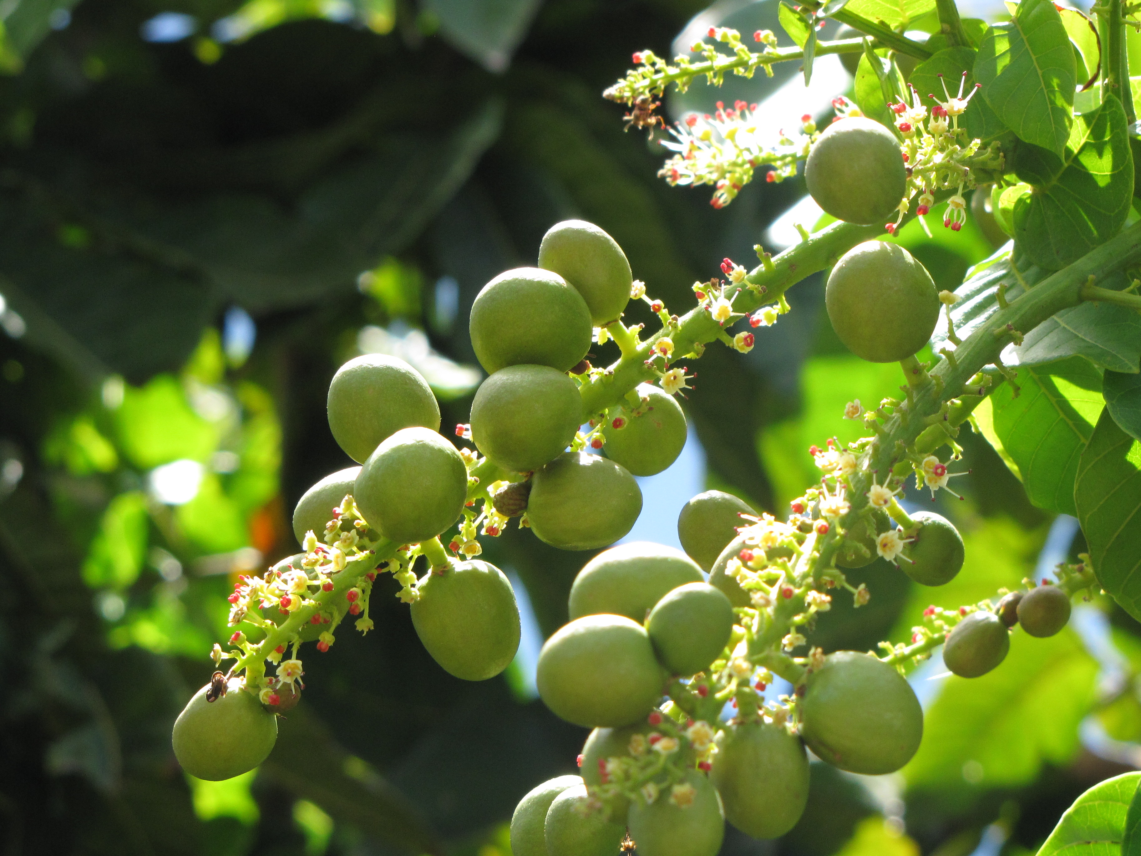 Pometia pinnata (Fijian longan, island lychee, langsir) Fruit at Napili, Maui, Hawaii. July 14, 2009 #090714-2727 Image Use Policy